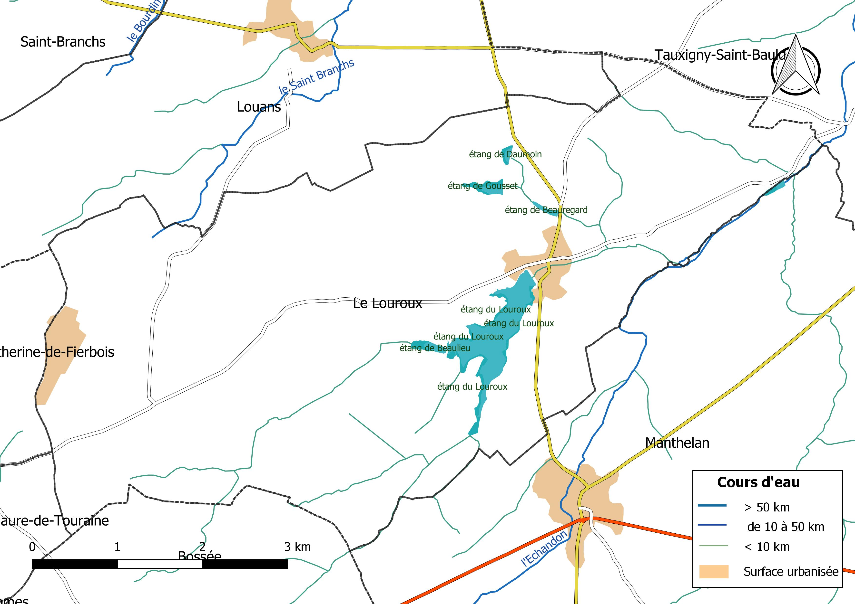 Carte du réseau hydrographique de la commune du Louroux (France).